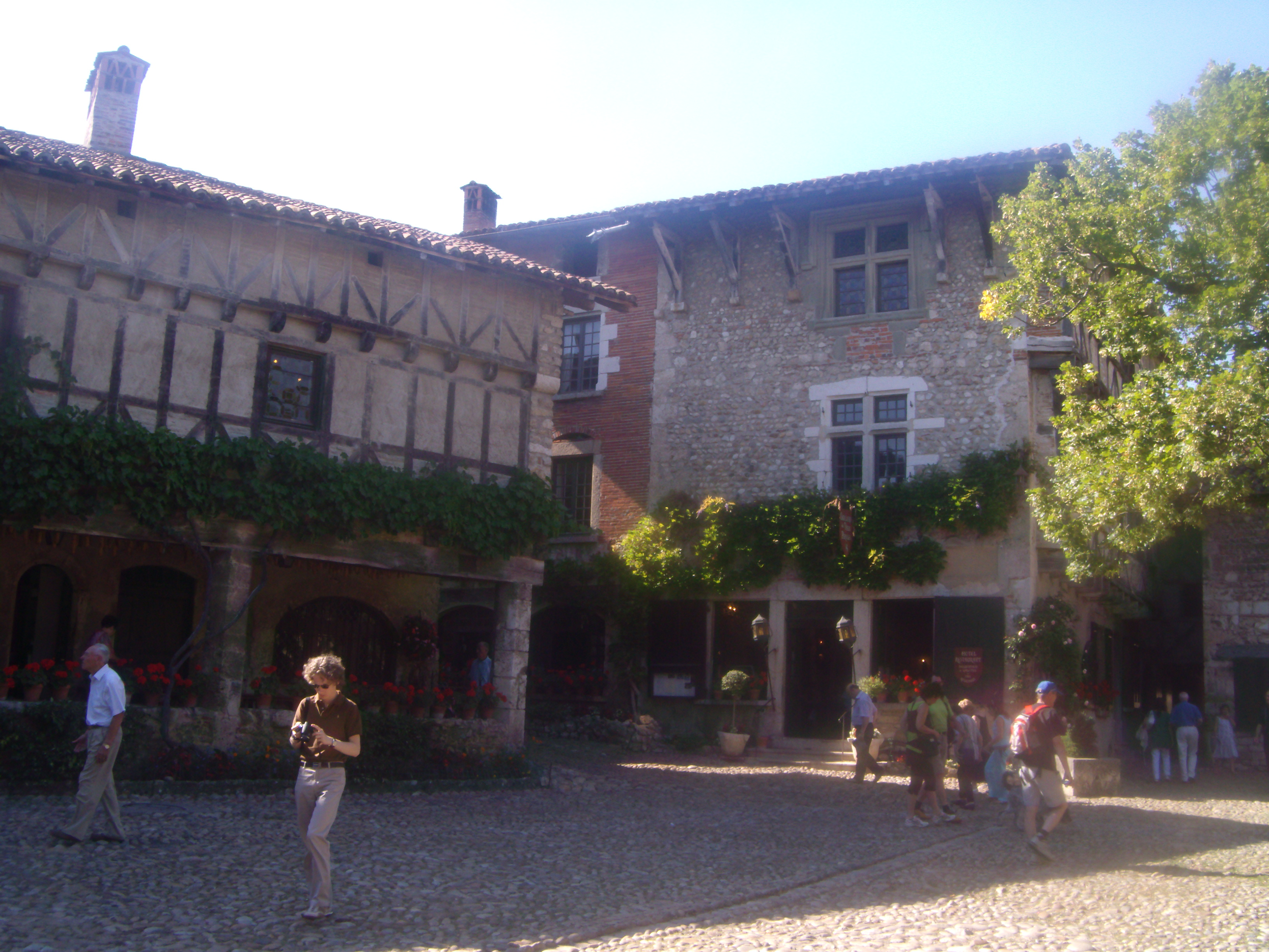 Rônes-Alpes; Ain; Pérouges Rônes-Alpes; Ain; Pérouges